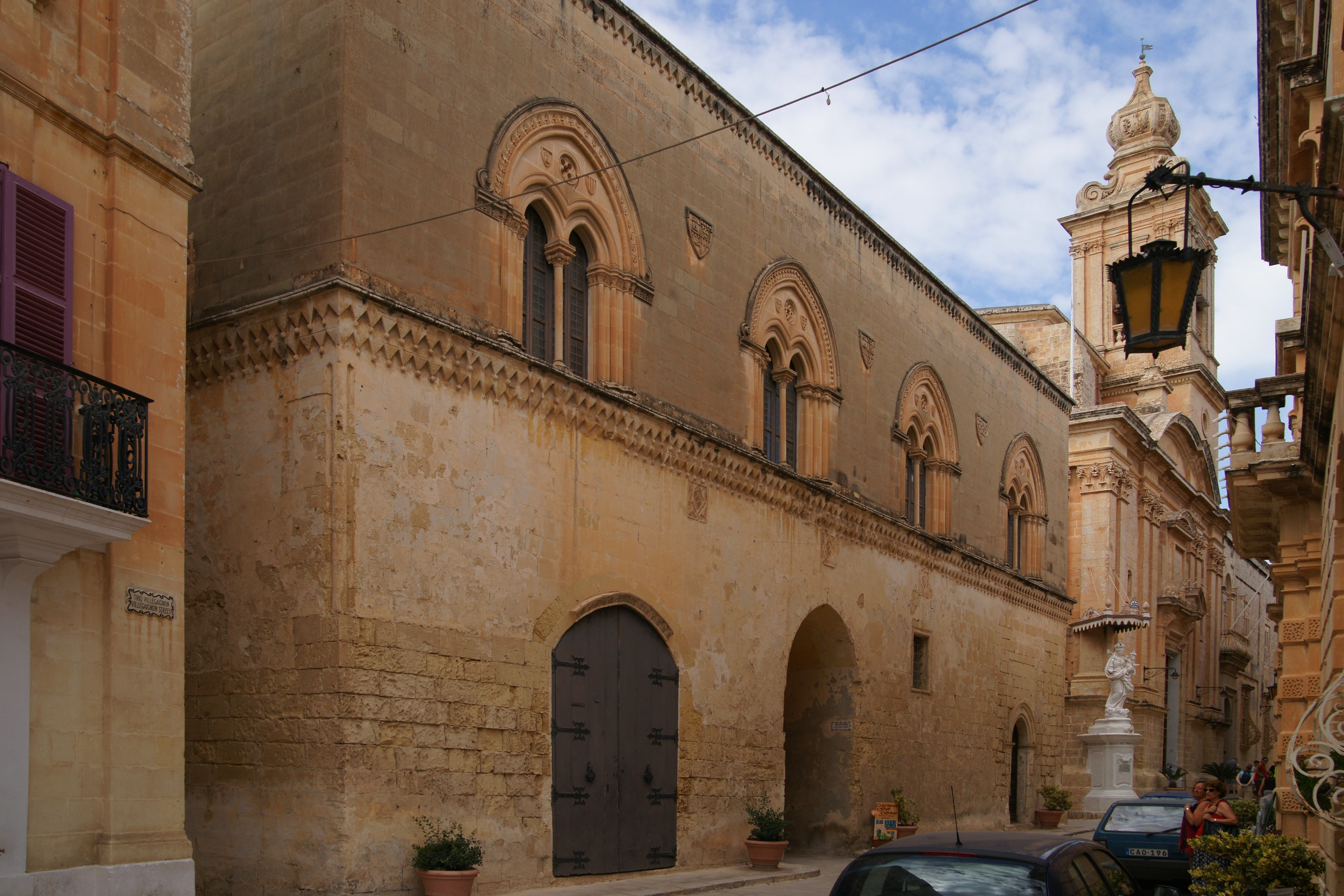 Palazzo Santa Sofia